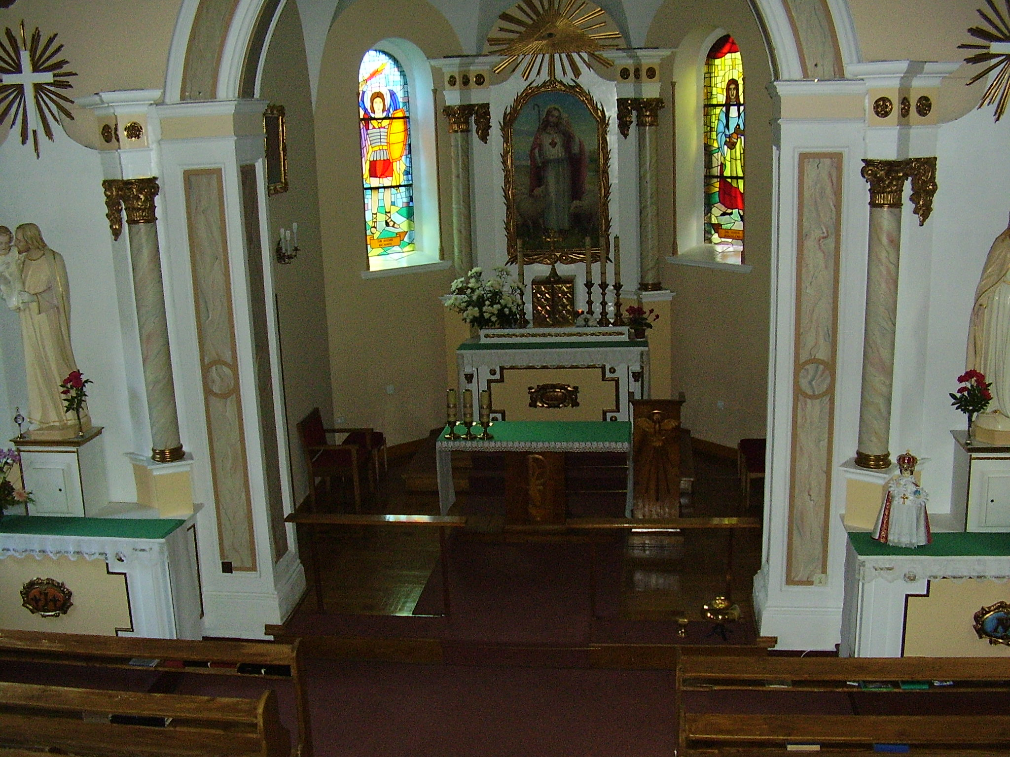 Klasztor Piątkowska